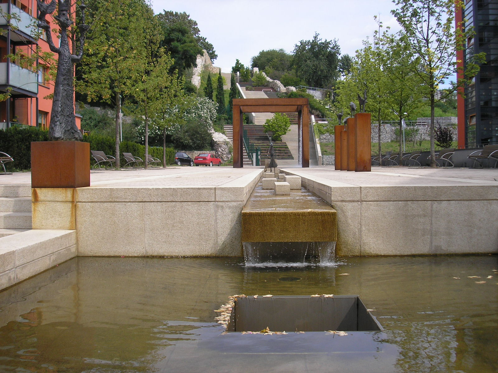 Eingang auf das ehemalige Landesgartenschaugelände in Nordhausen (Thüringen).